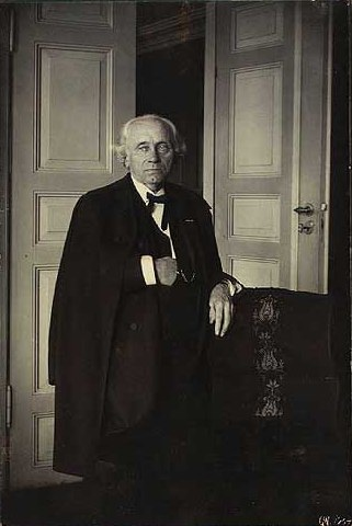 Lars Valdemar Tofte (1832-1907), Danish violinist